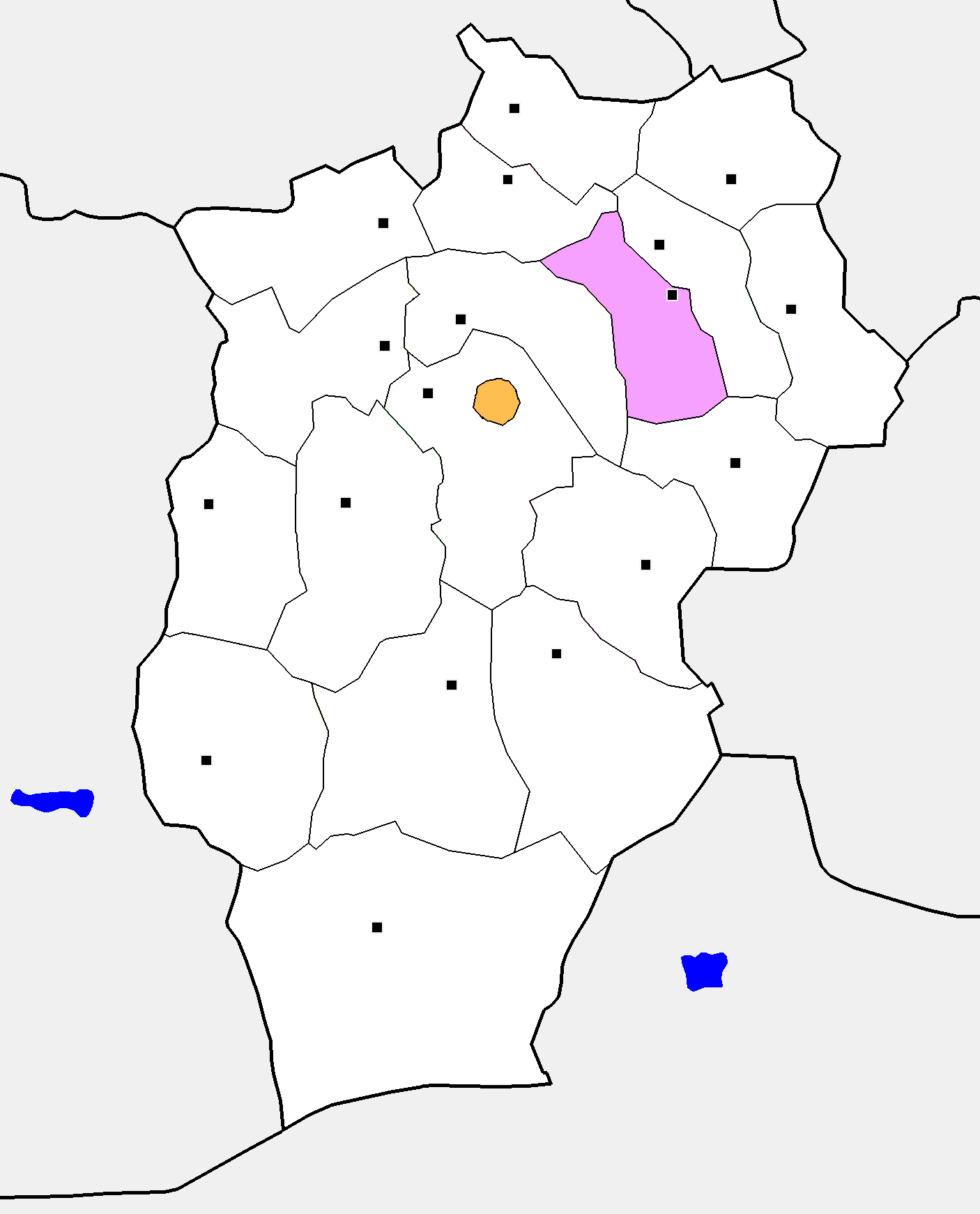 Монгол: Өвөрхангай аймгийн Өлзийт сумын байршил